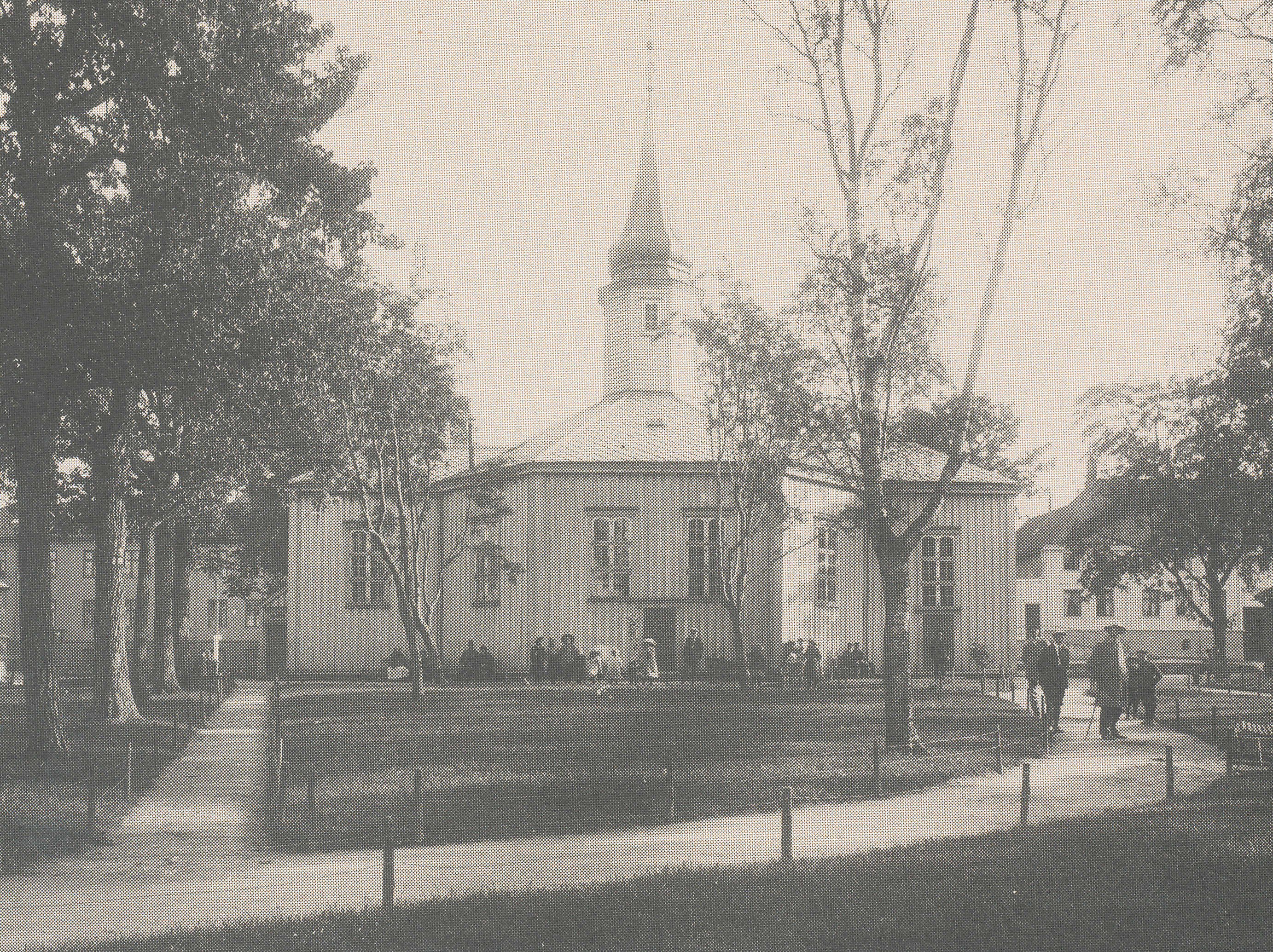 Hospitalskirken i 1898, fra en ukjent trykksak. Den ble malt hvit i 1891, men ble i 1929 malt rød. Den opprinnelige rødfargen fra 1706 fikk kirken tilbake ved hospitalsjubileet i 1977. Hospitalets sprøytehus fra 1843 er det lille huset helt til høyre. Her var det tidligere melkeutsalg. Mannen med skjegg og stokk er daværende forstander ved Hospitalet, Klaus Høyem. Ukjent fotograf.